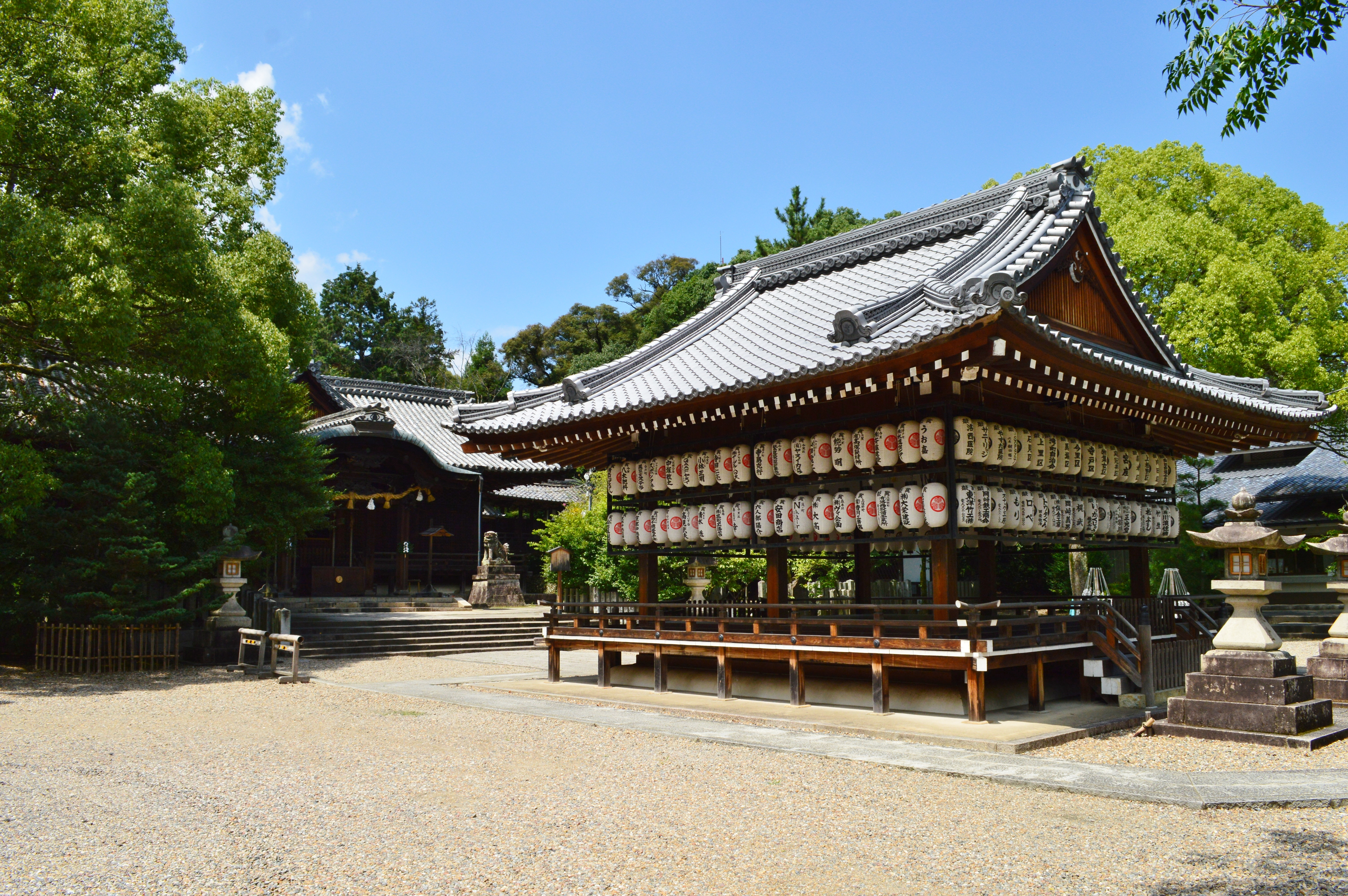 向日神社 社殿